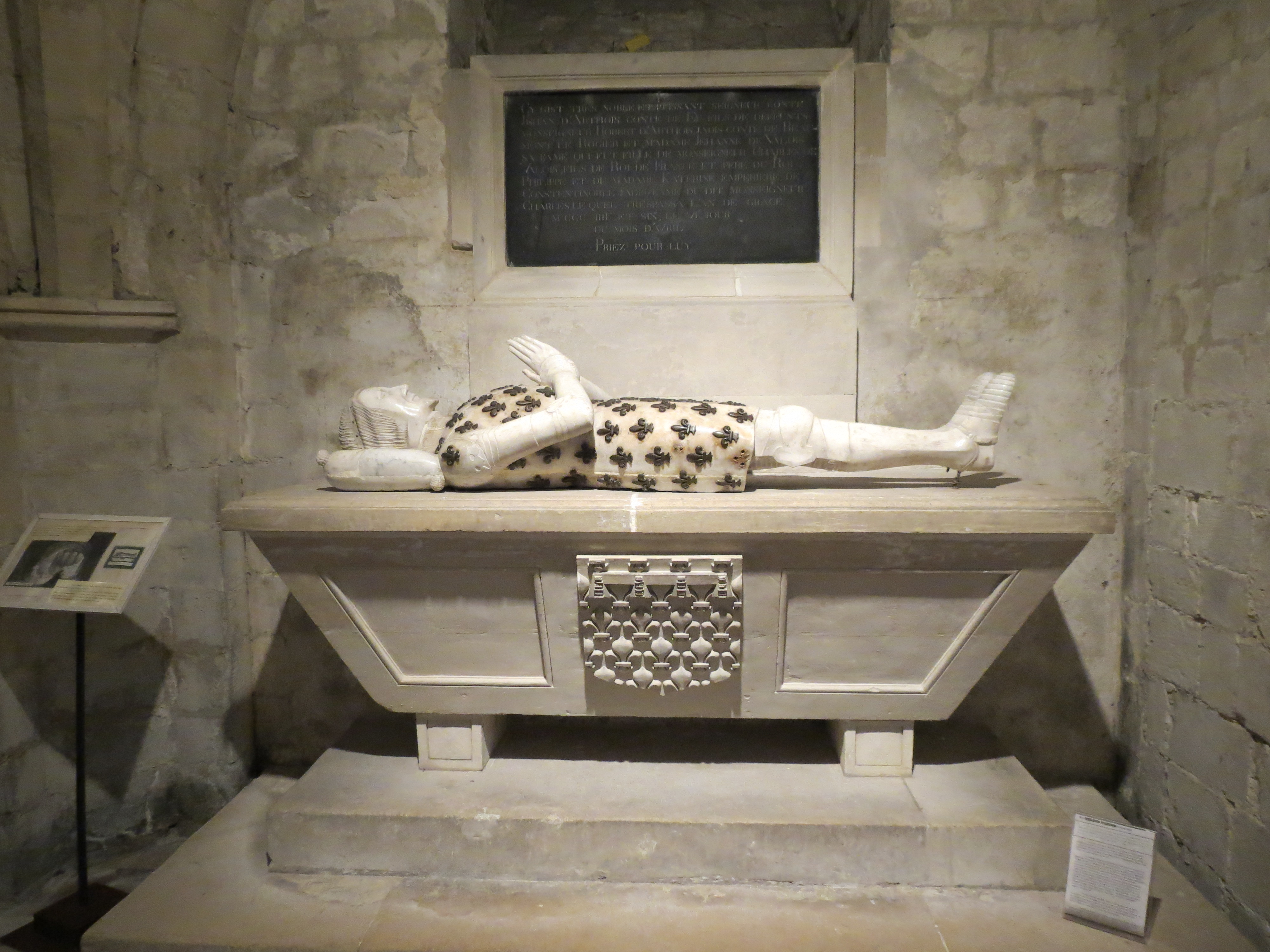 Gisant de Philippe d'Artois.